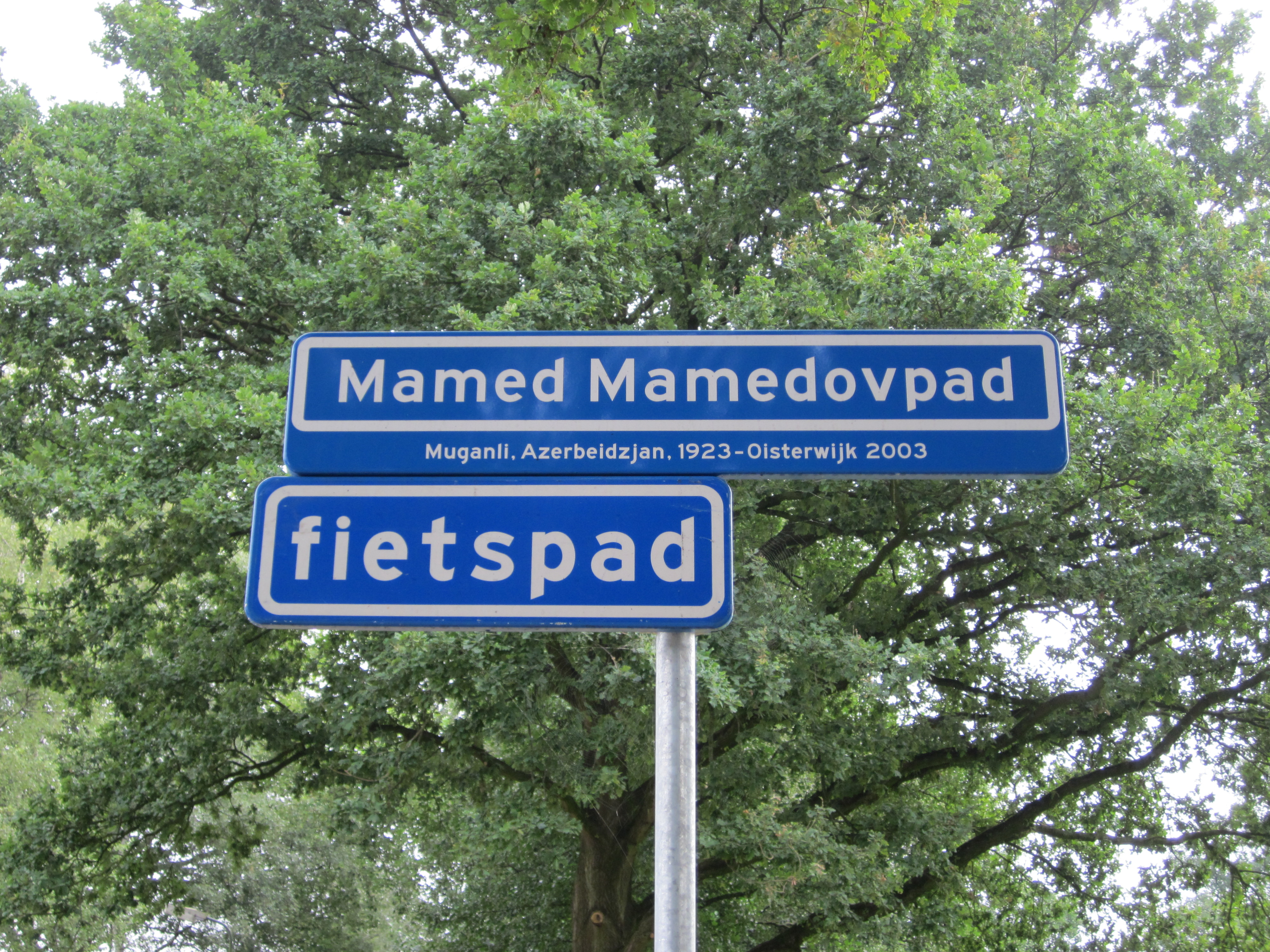 Iedere straat heeft zijn verhaal. De verhalen beginnen om de hoek. Zie hier de essensie van mijn weblog. Maar je moet het wel zien. Donderdag was ik in Oisterwijk en kruistte ik het volgende straatnaambord . “Mamed Mamedovpad, Muganli, Azerbeidjan, 1923- Oisterwijk 2003″ . Ik voelde het. “Hier moet een verhaal achter schuilen”, zo dacht ik meteen.